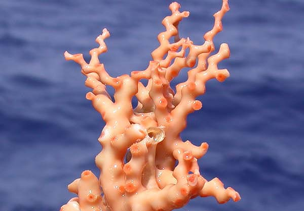 Madrepora occulata (Anthozoa : Zoantharia : Scleractinia : Oculinidae)